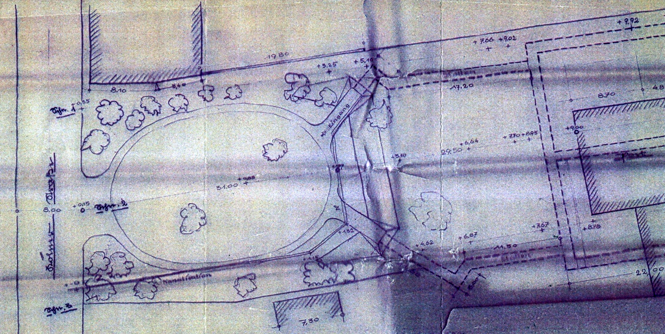 Bunkeranlage an der Kölner Strasse in Wermelskirchen 1944